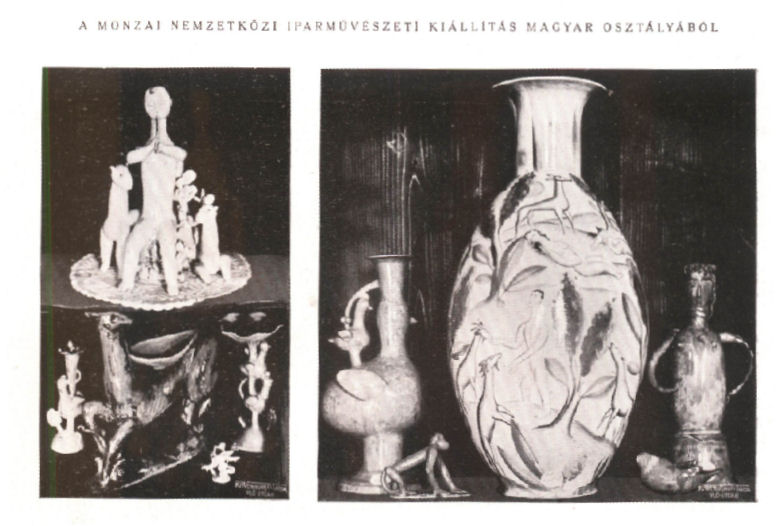 Gádor István kerámiák az 1920-30-as évekből